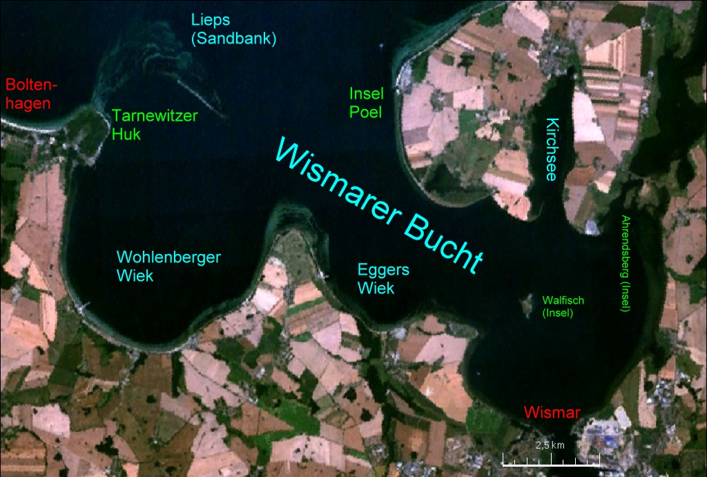 NASA-Satellitenbild der Wismarer Bucht, geographische Namen hinzugefügt